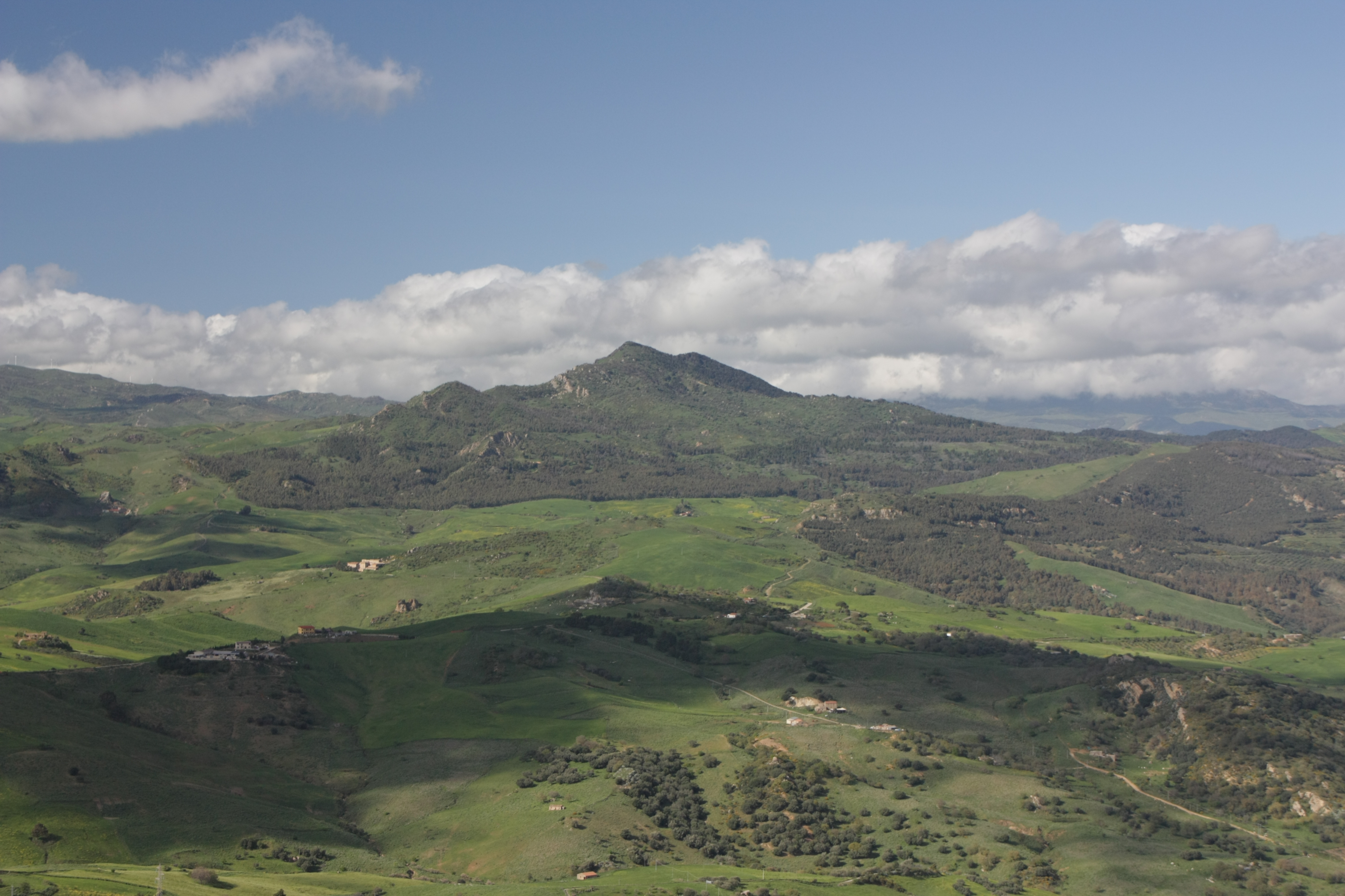 Monte Altesina da Calascibetta